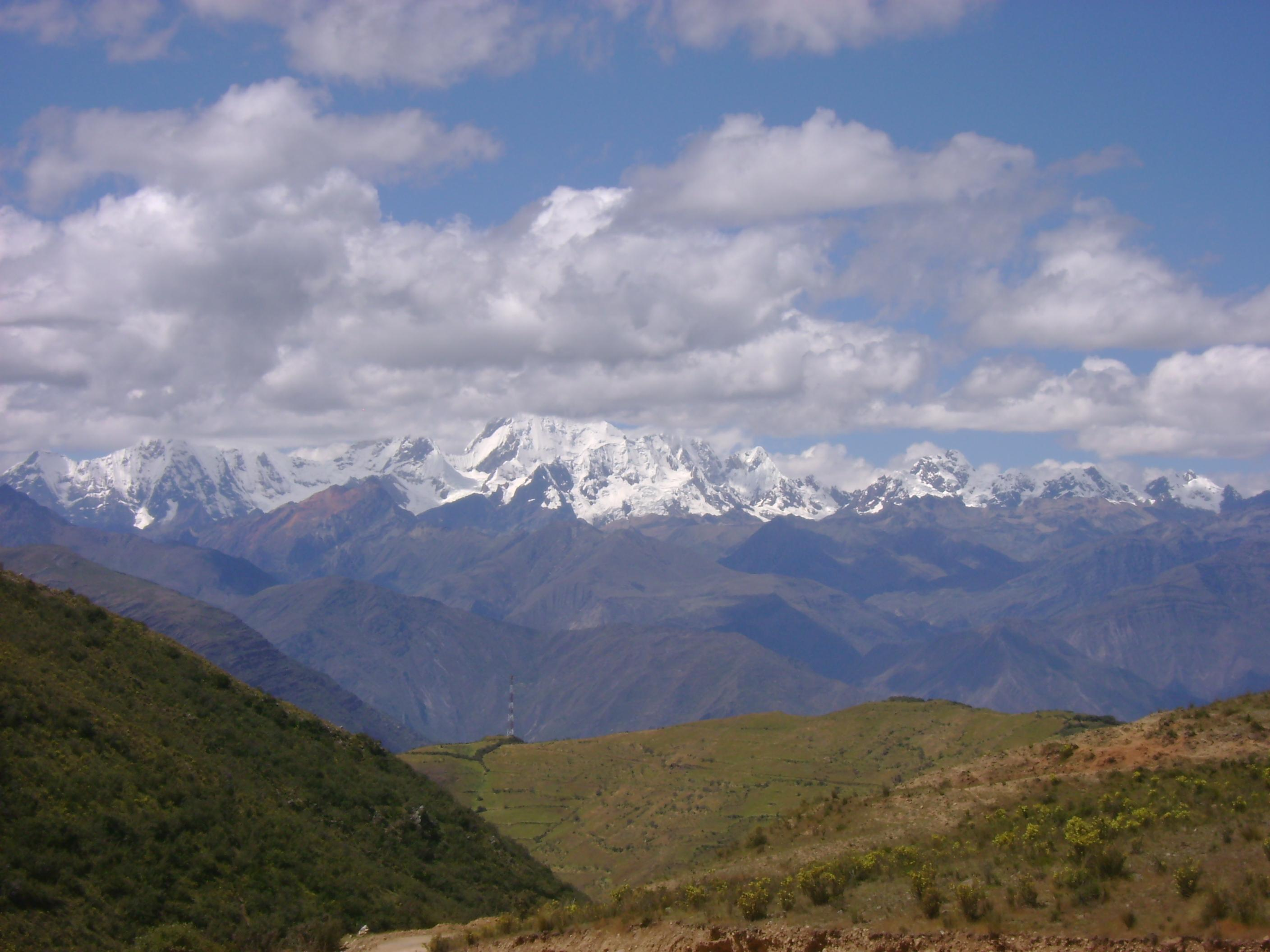 Cordillera Huayhuash desde la trocha.